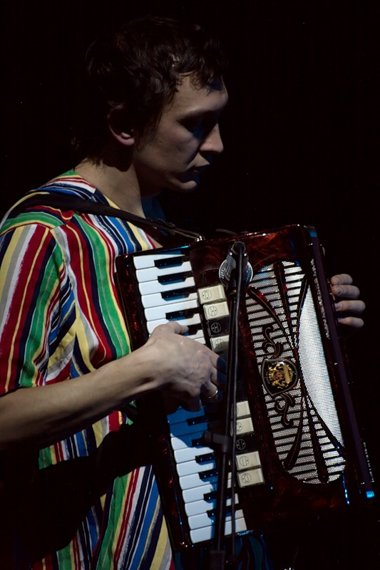 Участник "Небослова"